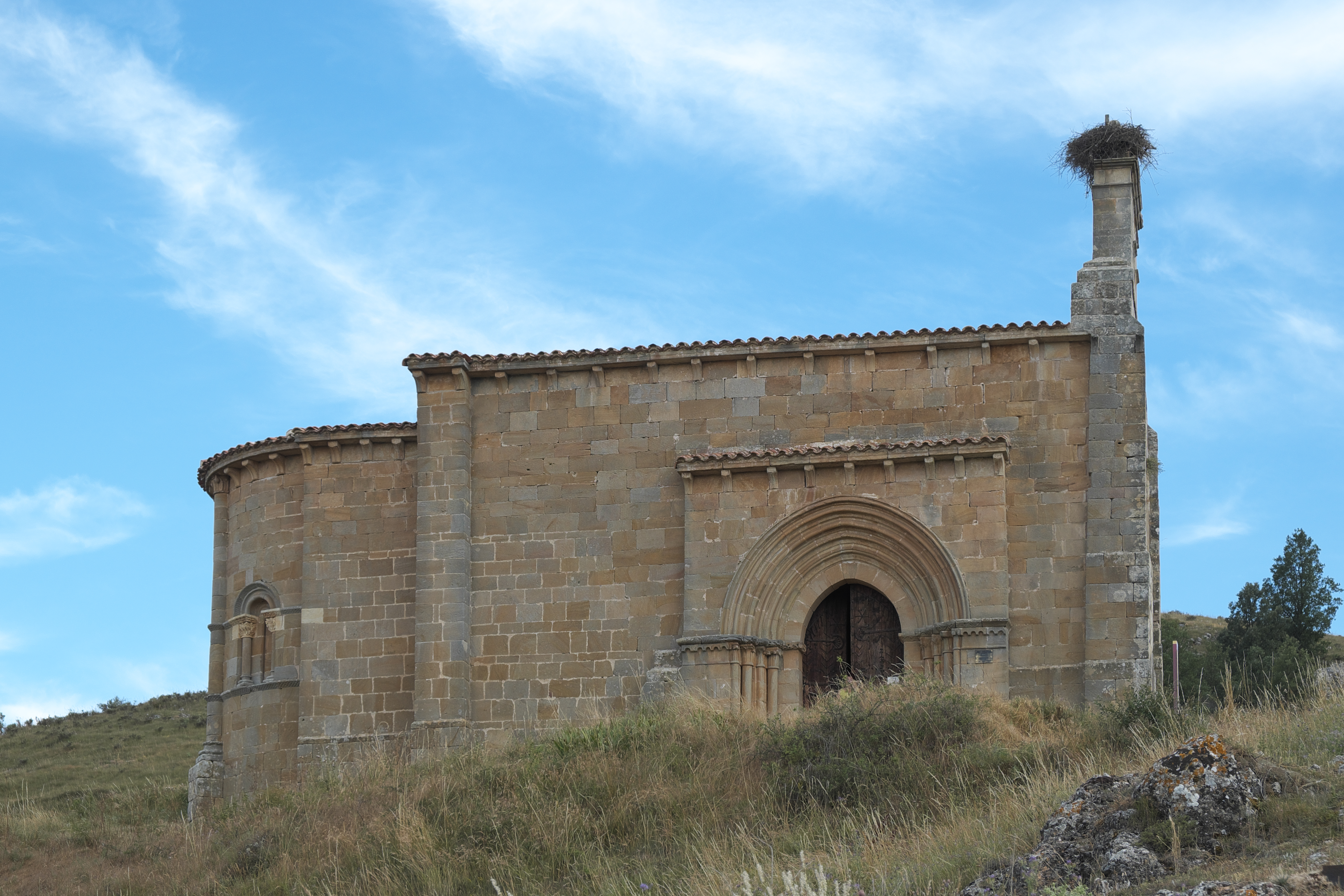 Ermita Santa Eulalia in Barrio de Santa María (Aguilar de Campoo) in der Provinz Palencia (Kastilien-León/Spanien), Ansicht von Norden